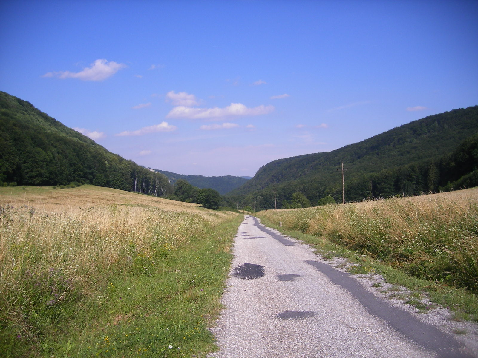 Barka - tájkép a község keleti részén